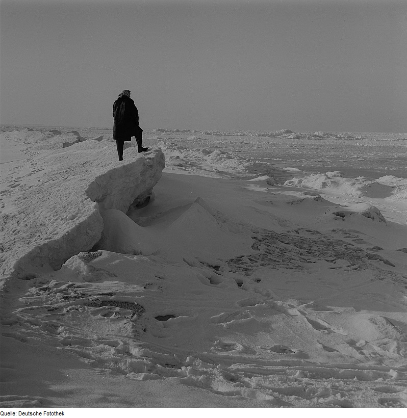 Original image description from the Deutsche Fotothek Rügen. Bei Kap Arkona. Winter an der Ostsee